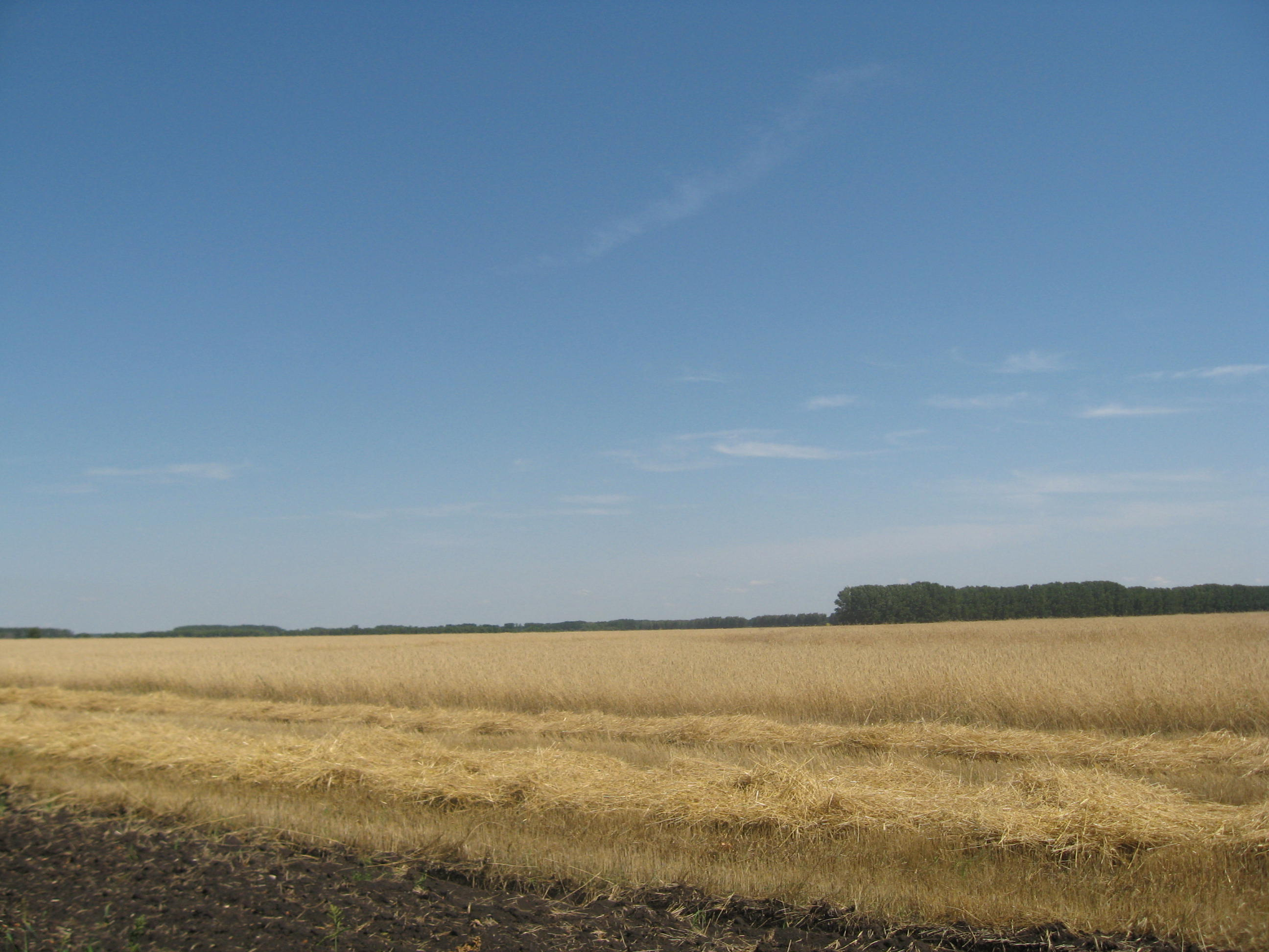 Аннинские поля